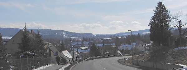 Rodewitz/Spree